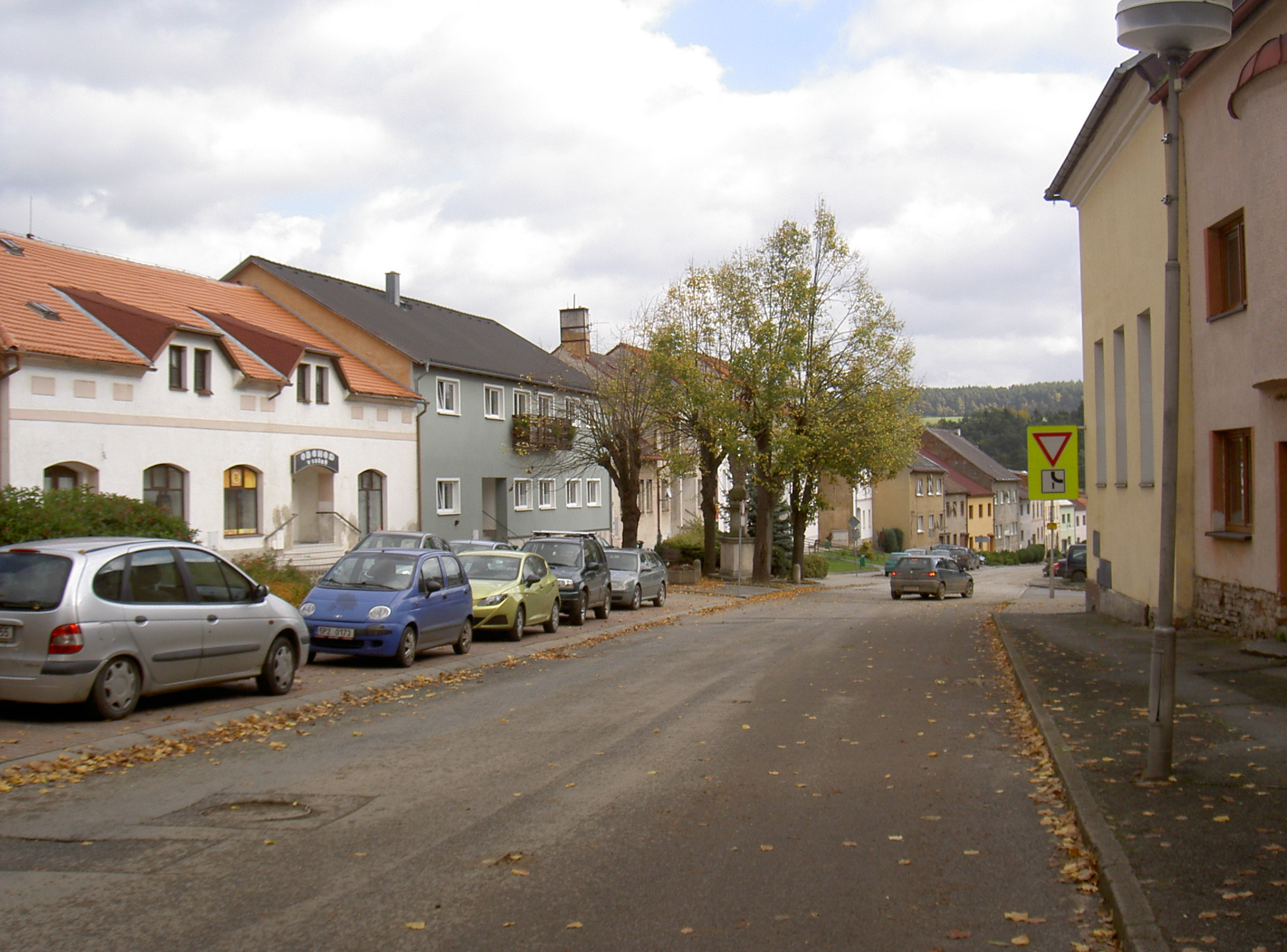 Hostau